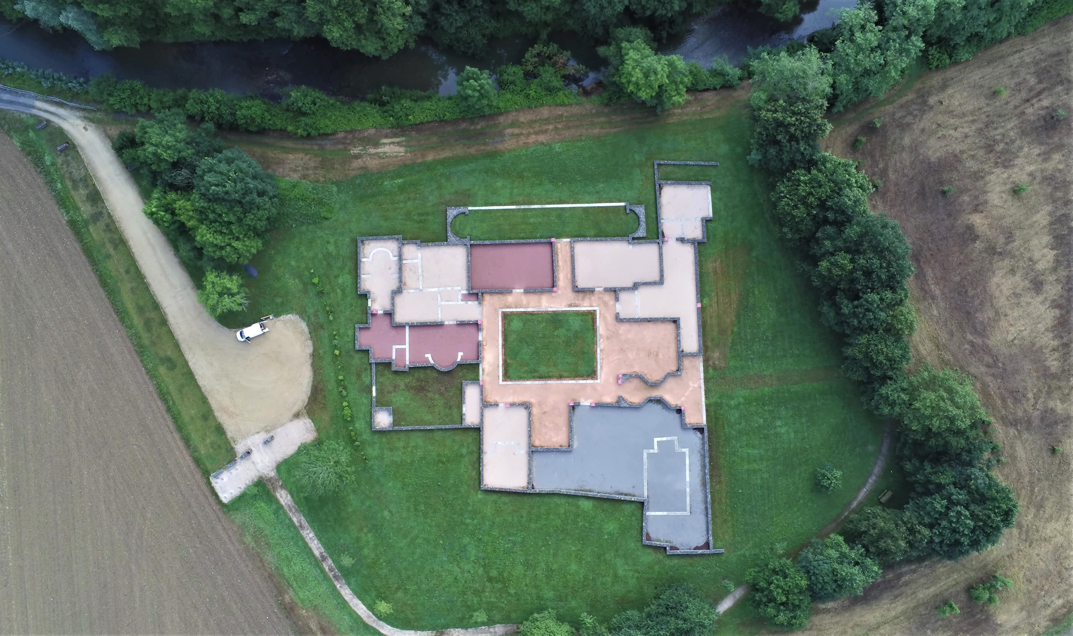 Vue aérienne de la Villa de Lalonquette prise par drône